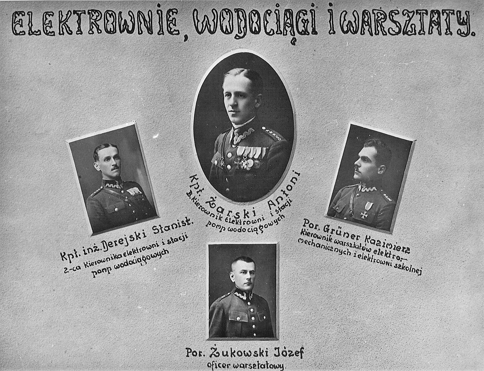 zdjęcie z albumu